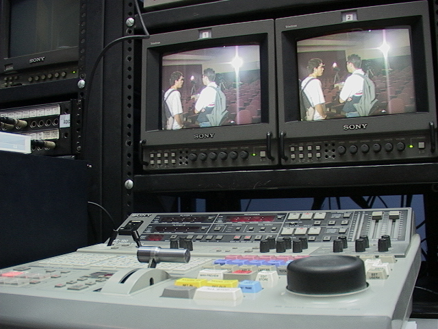 UFT Televisión es una televisora universitaria cultural, cuya misión y visión abarca un nuevo concepto de televisión educativa, que involucra la incorporación de los nuevos lenguajes audiovisuales y nuevas tecnologías a la difusión del conocimiento. Una relación respetuosa con el espectador nos permite reforzar la educación para los valores humanos propuesta por la Universidad Fermín Toro. El Proyecto está estructurado en varias fases operativas que desde ese entonces se han cumplido. Dichas fases incluyen la instalación de la plataforma tecnológica, infraestructura física, preparación conceptual y técnica del personal, planificación a corto, mediano y largo plazo relativa al circuito interno, nuestra salida al aire, programación, producción y alianzas estratégicas para la co-producción y difusión. UFT Televisión incorpora activamente nuestros estudiantes de Comunicación Social, en la realización del proyecto informativo de la televisora. Dentro de nuestros planes de autofinanciamiento se incluyen los servicios ofrecidos por nuestra Productora: Pre-Producción, Producción y Post-Producción de videos corporativos, micros, documentales, programas de televisión, series, comerciales, alquiler de estudio televisivo y equipos, incluyendo asesorías. Estas últimas abarcan formulación y desarrollo de la idea, guiones y elaboración de proyectos.